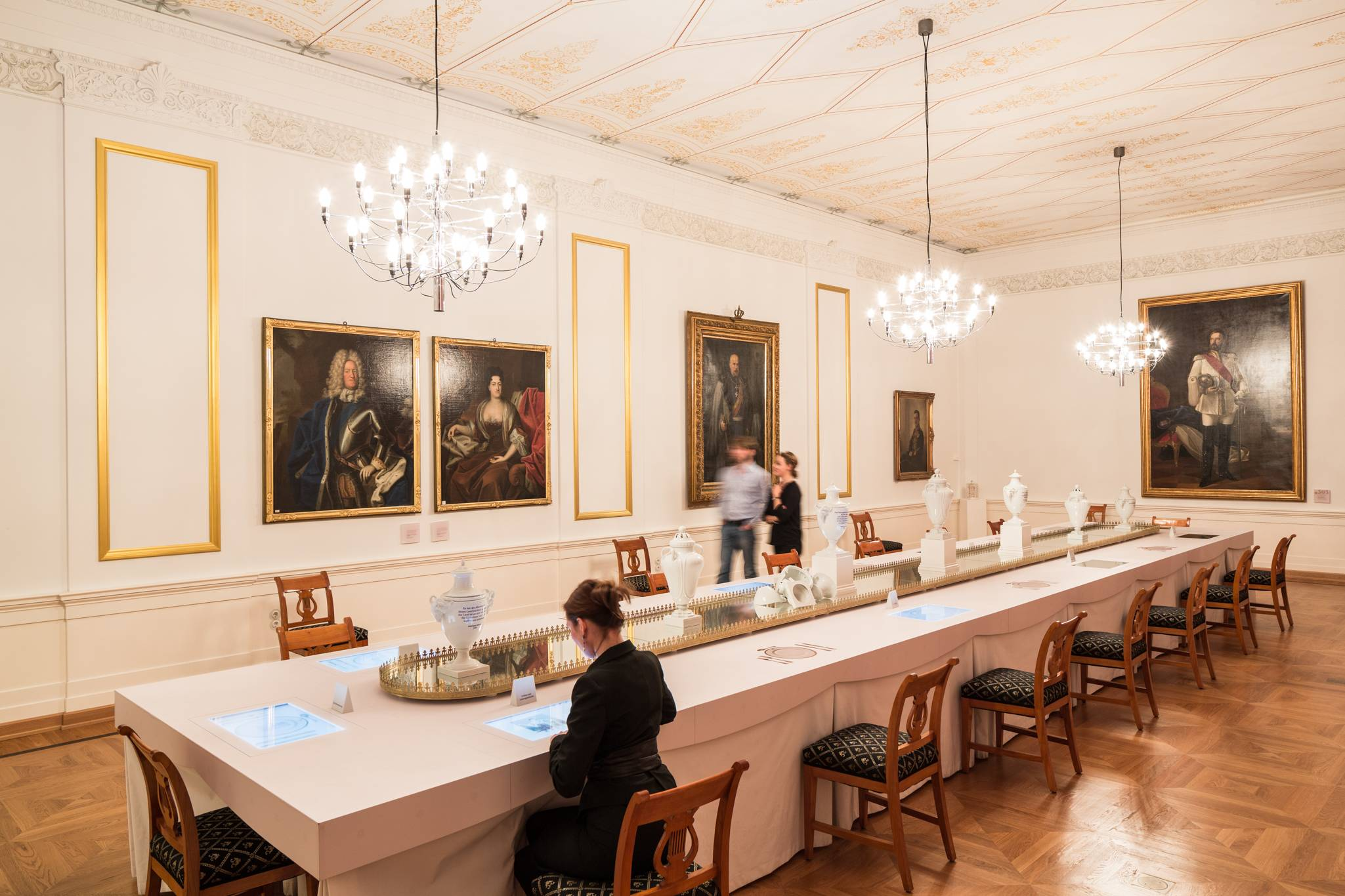 Der Weiße Saal ist ein Raum im Schlossmuseum Braunschweig, in dem sich die Besucher multimedial über die Schlossgeschichte informieren können.